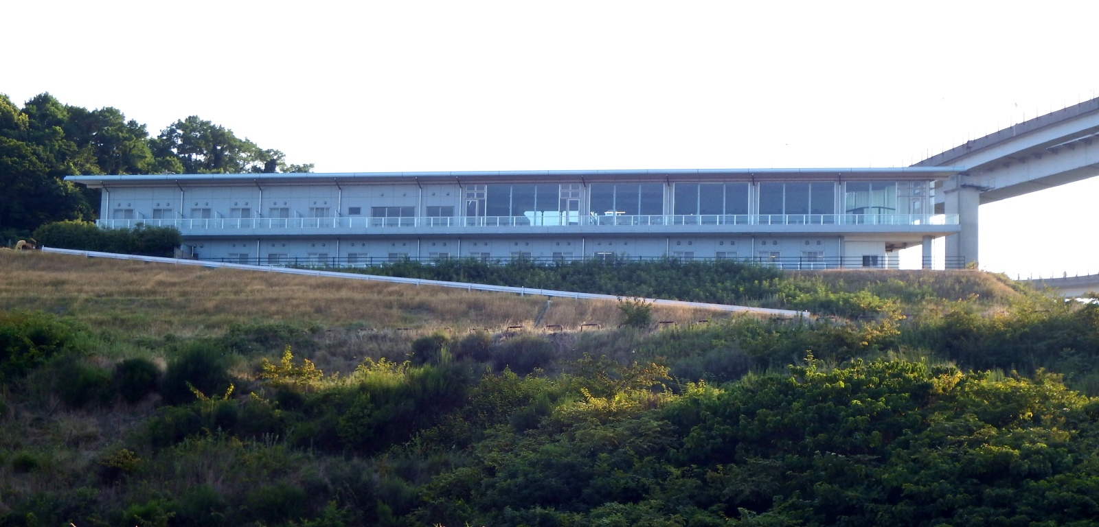 サンライズ糸山を海側から